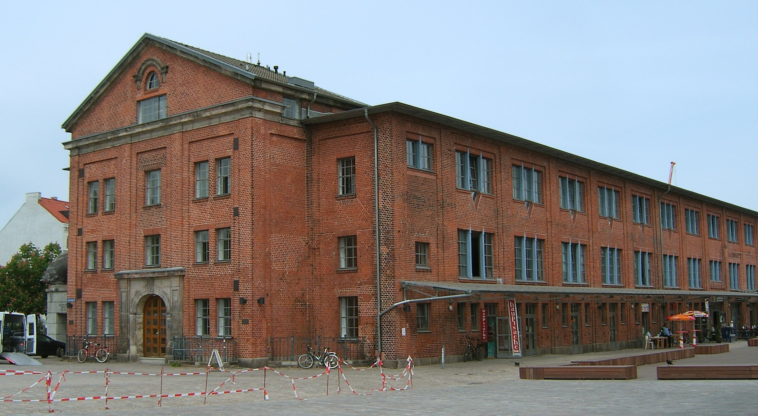 Die „Alte Rinderschlachthalle“ liegt heute außerhalb des Geländes des Fleischgroßmarktes auf St. Pauli. This is the photograph of an architectural monument. It is part of the list of cultural monuments of Hamburg, no. 1432